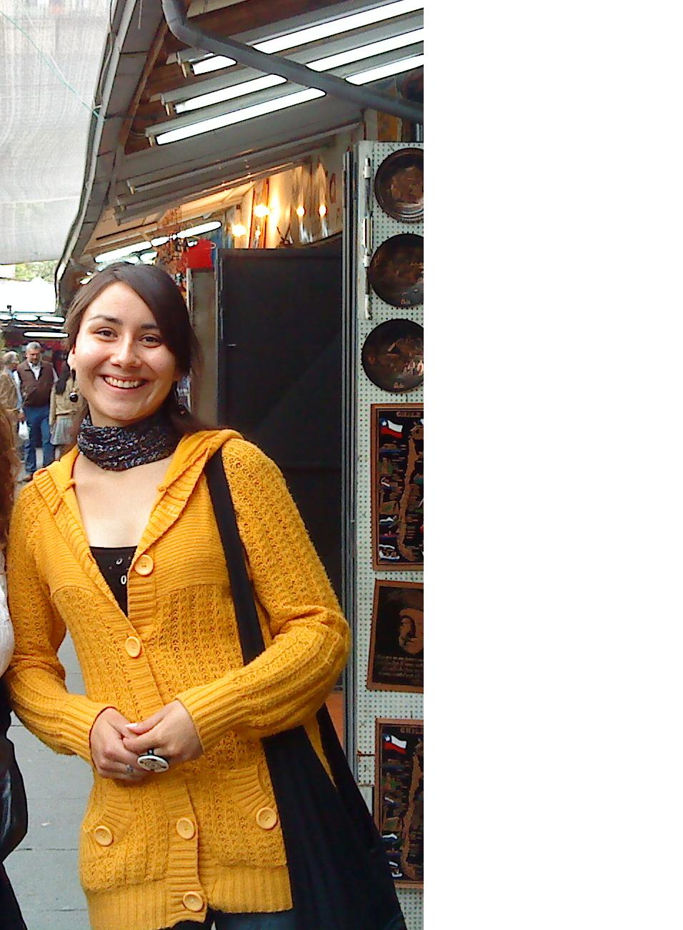 Camila Díaz Díaz en evento social